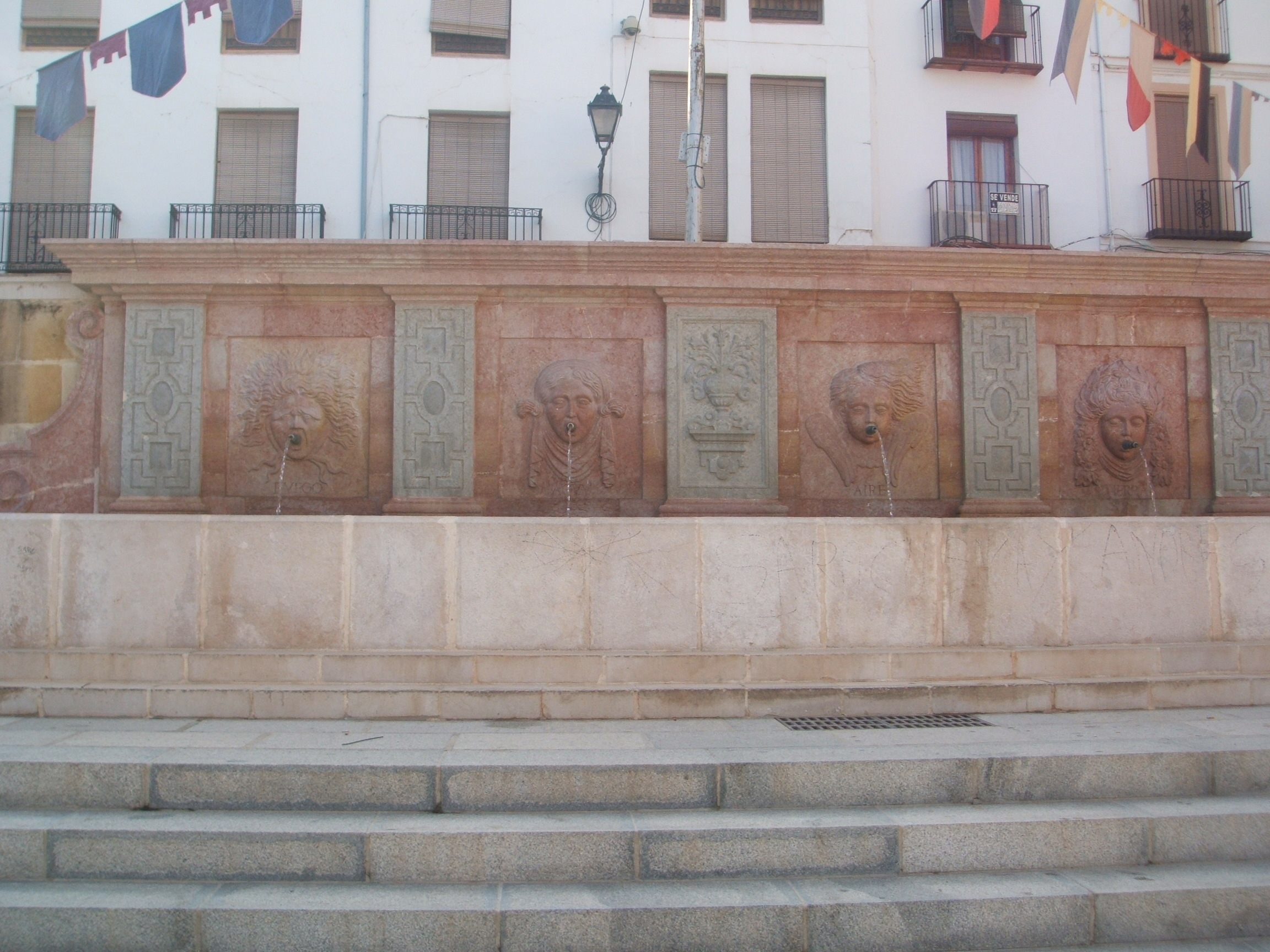 Fuente de los Cuatro Elementos, Antequera